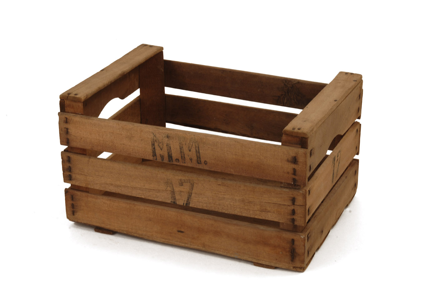 Fotografies dels objectes de l'exposició permanent de la sala "Secà i Muntanya" del Museu Valencià d'Etnologia - Fotografies de Mateo Gamon.